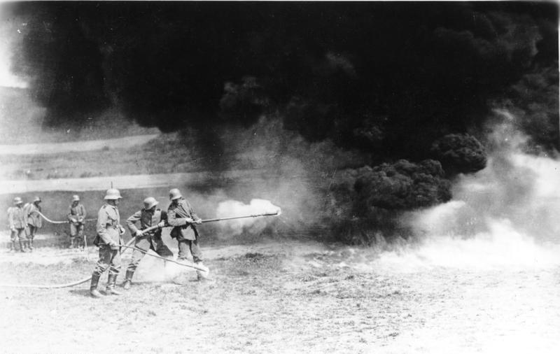 Westfront, Flammenwerfer ADN-ZB-Archiv I.Weltkrieg 1914-18 Westeuropäischer Kriegsschauplatz 1917 Einsatz von Flammenwerfern bei den deutschen Truppen. [Scherl Bilderdienst]